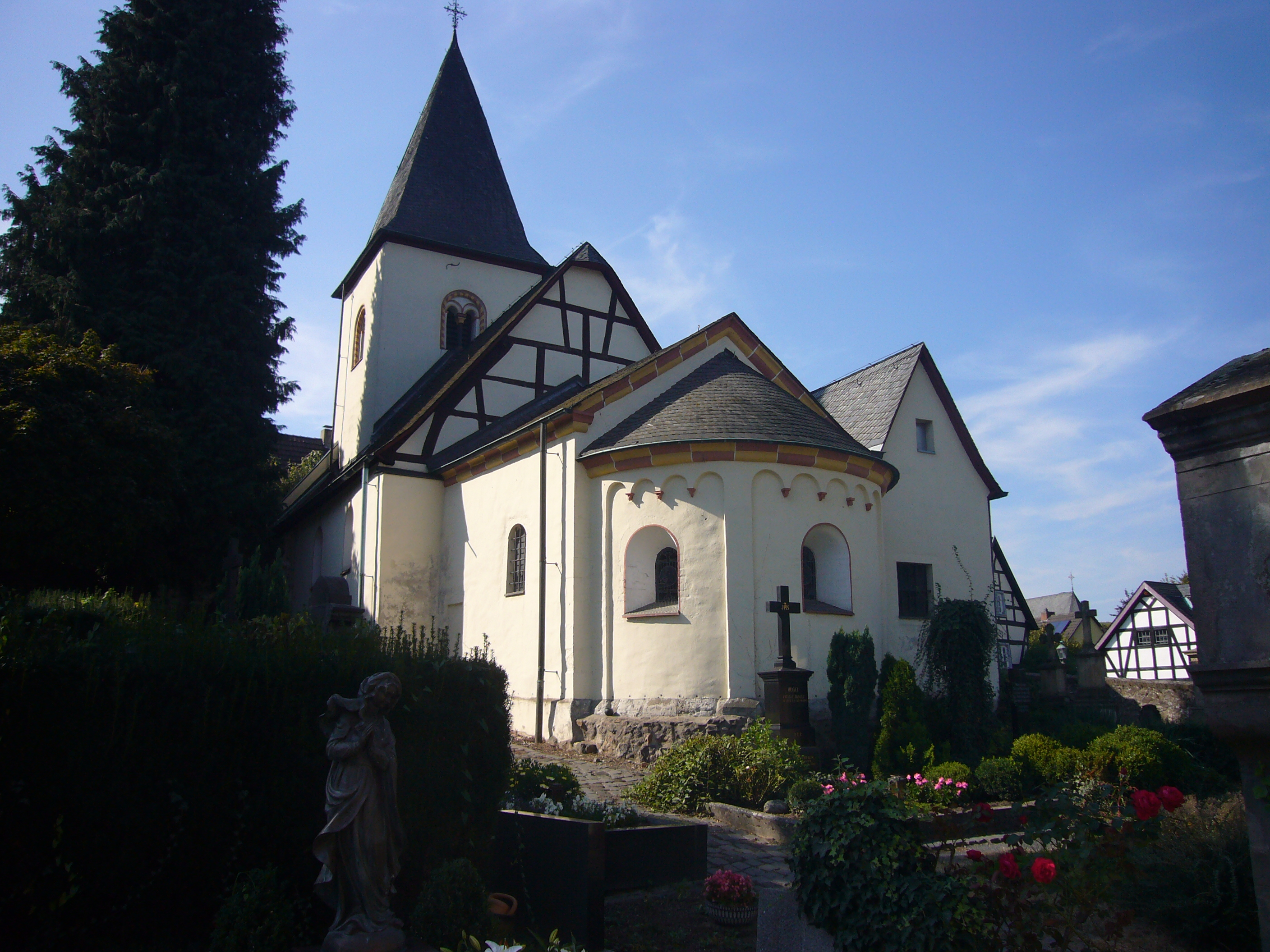 Die katholische Pfarrkirche (Alt) St. Martin in Muffendorf, Bonn-Bad Godesberg